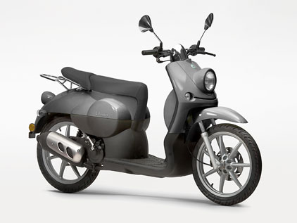 Benelli robogó